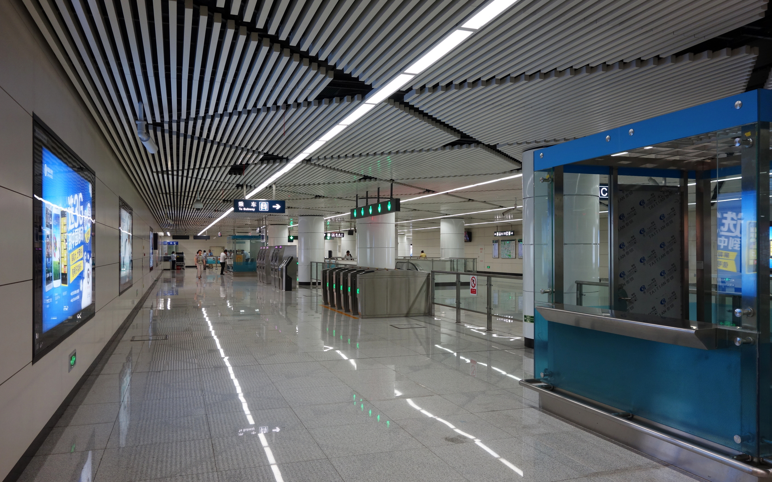 北京地铁10号线西钓鱼台站站厅。天花板上装饰格栅排列呈现犹如水波荡漾的水面。